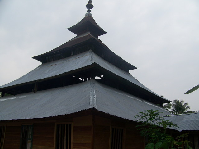 Masjid 60 Kurang Aso